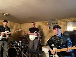 Sužnji sendvičev, 2019